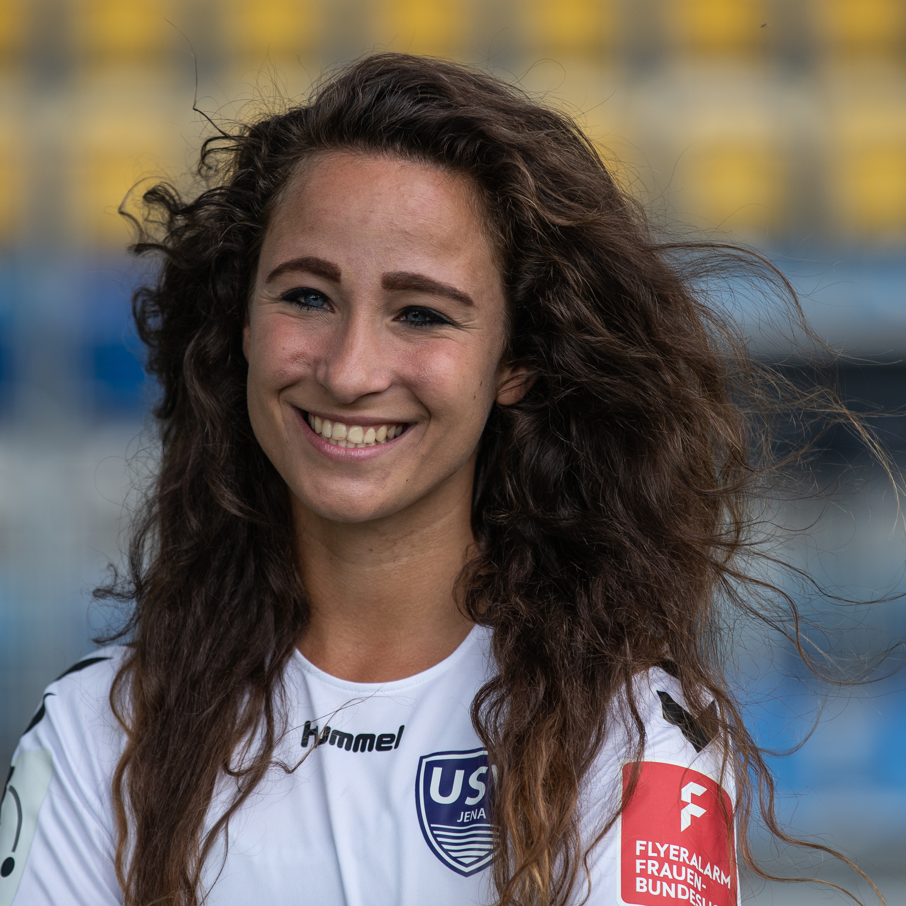 Fußball, Flyeralarm Frauen-Bundesliga, Mannschaftsfotos FF USV Jena; Julia Arnold (FF USV Jena, 13); Porträt, Einzelbild